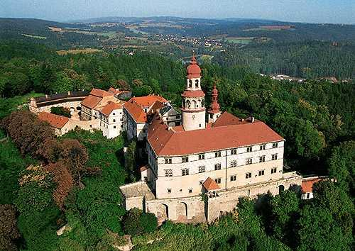 Castello di Nachod - Boemia - Castello di Ottavio Piccolomini